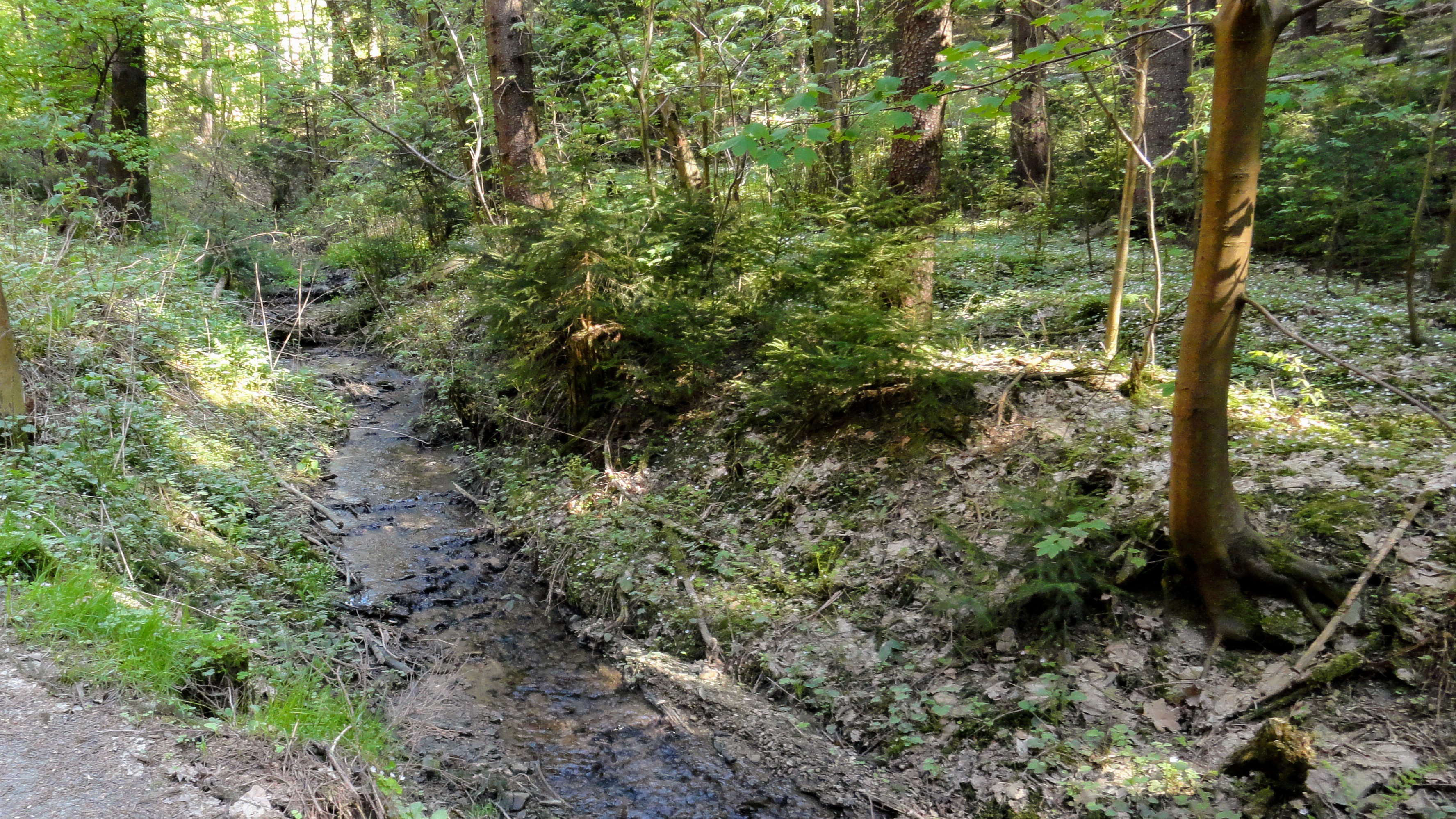 Brlenka, horní tok